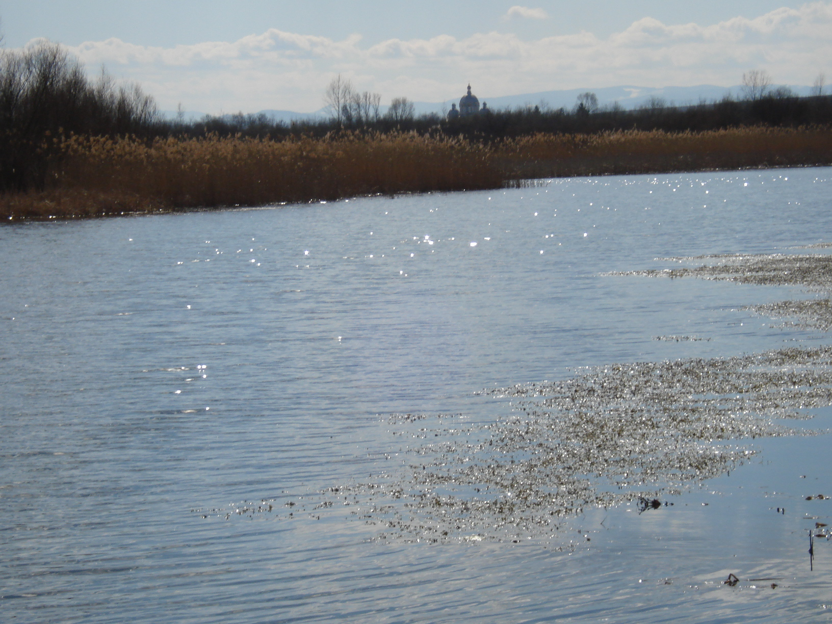 Фото зроблено в урочищі "Зарінок"